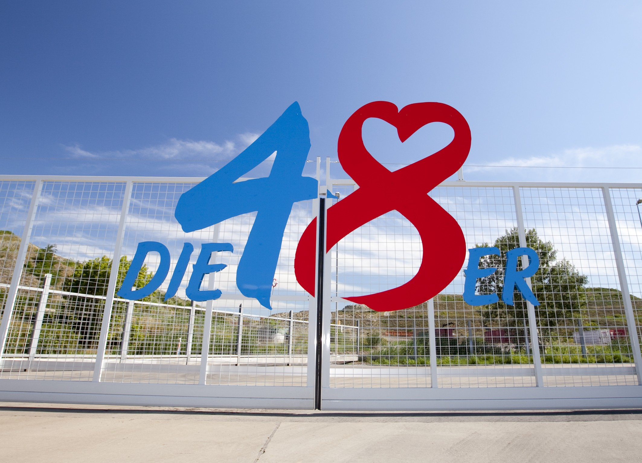 Eingang der Deponie Rautenweg, MA 48